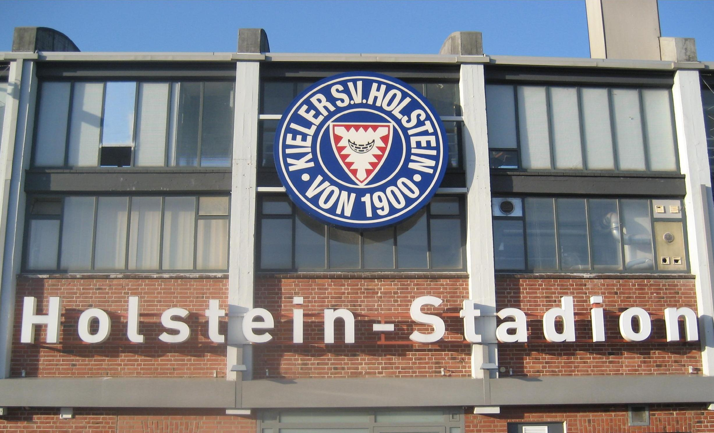 Holstein-Stadion, Schrift mit Wappen auf der Hauptribühne